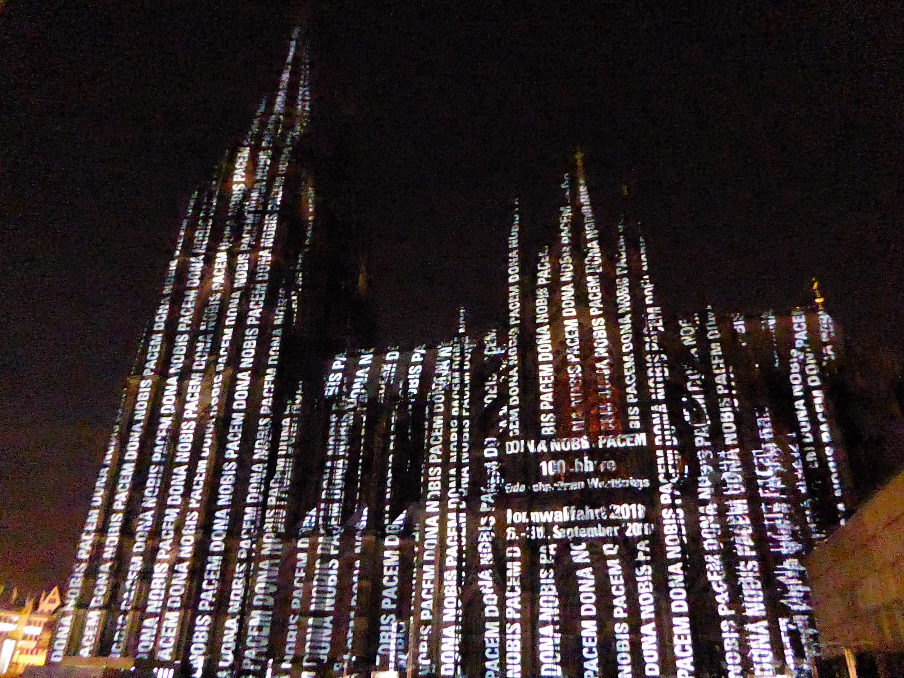 Illumination des Kölner Doms vom 26. bis 30. September 2018